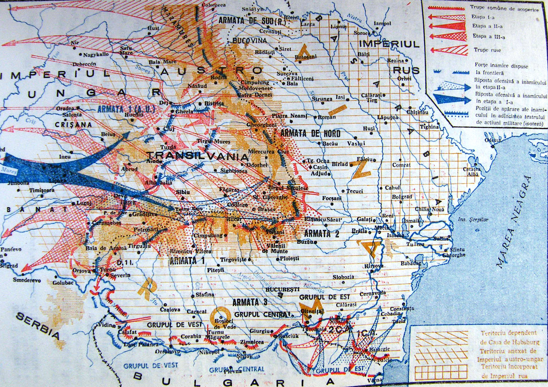 Planul de campanie român din 1916 - Sursa - fotocopie proprie din lucrarea : România în anii primului Război Mondial, Editura Militară, București, 1987 - Imaginea este în domeniul public din 1992, conform art. 7 din Decretul nr.321 din 18 iunie 1956